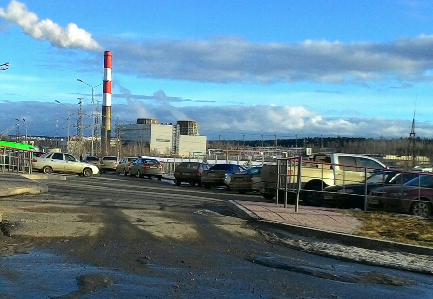 улица пограничная